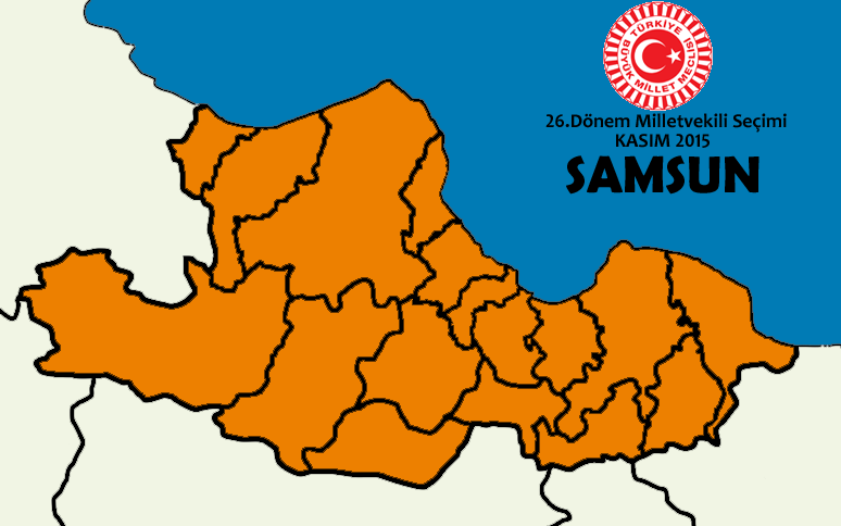 Kasım 2015 Seçimleri